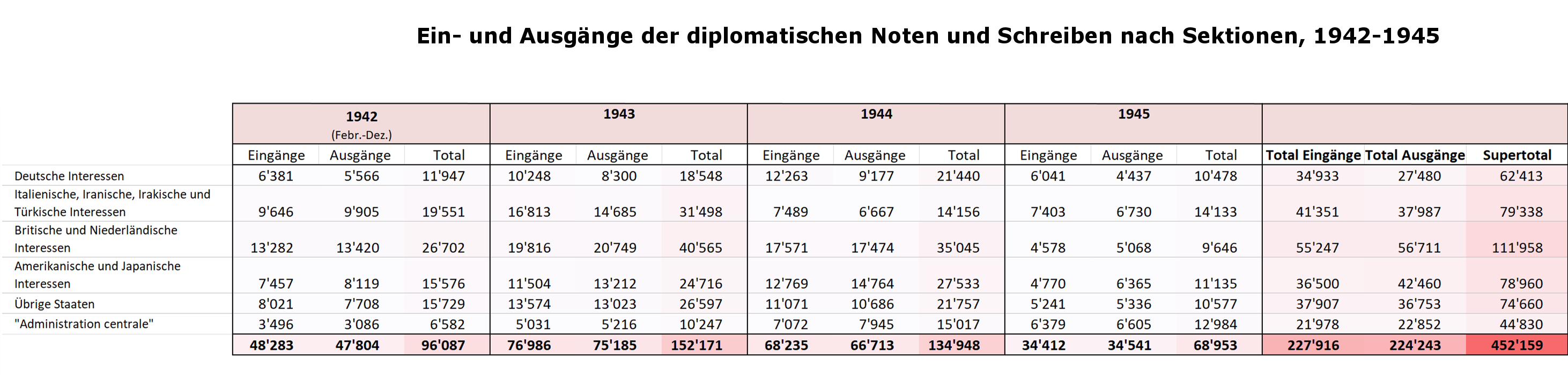 Tabelle über den diplomatischen Korrespondenzwechsel nach Sektionen für die Jahre 1942-1945 (Ein- und Ausgänge der Noten und Schreiben). Informationsquelle: Rechenschaftsbericht der Abteilung für fremde Interessen des Eidgenössischen Politischen Departementes für die Zeit von September 1939 bis Anfang 1946, S. 75.